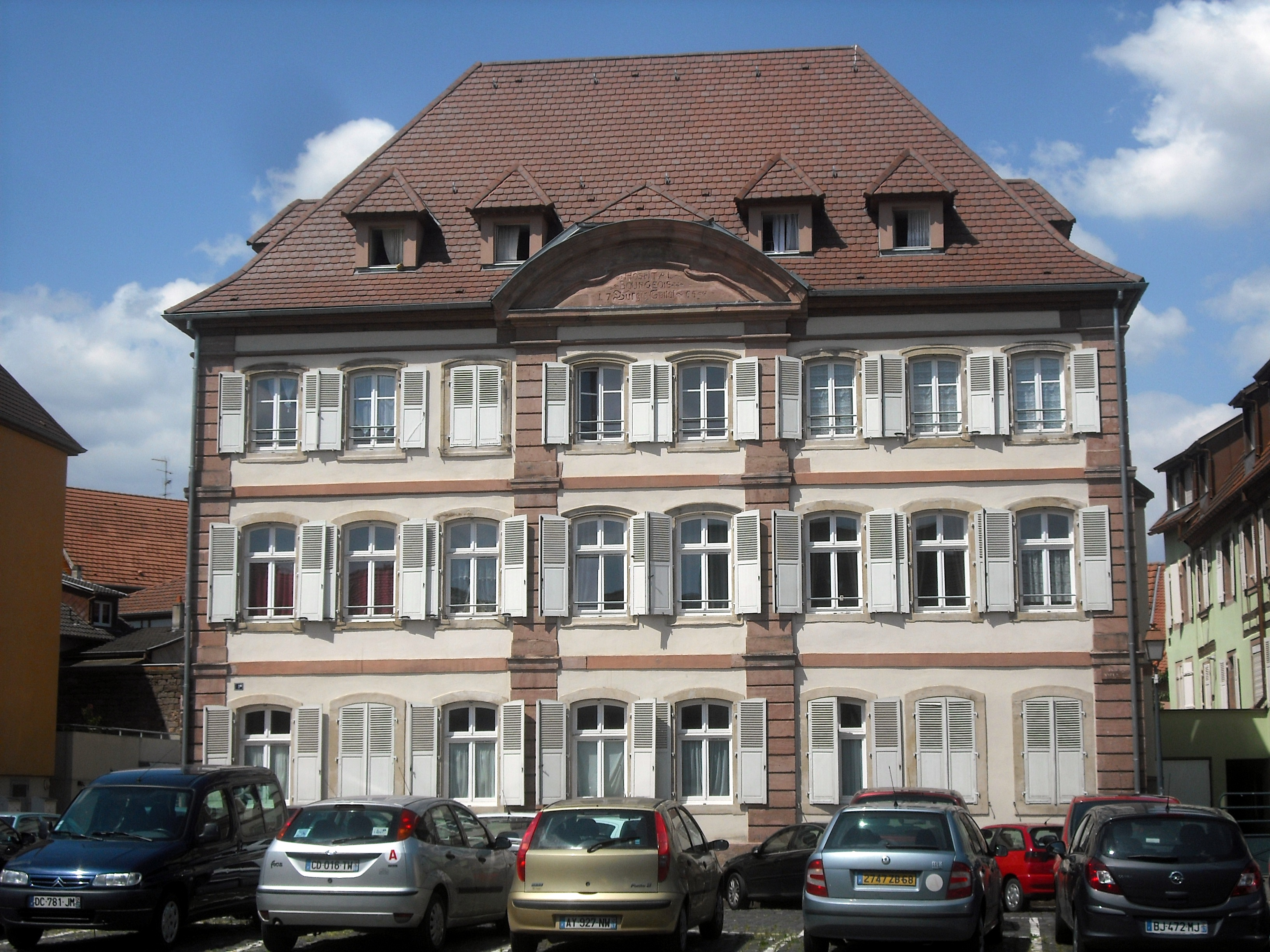 Bürgerspital, Schlettstadt, Département Bas-Rhin, Frankreich